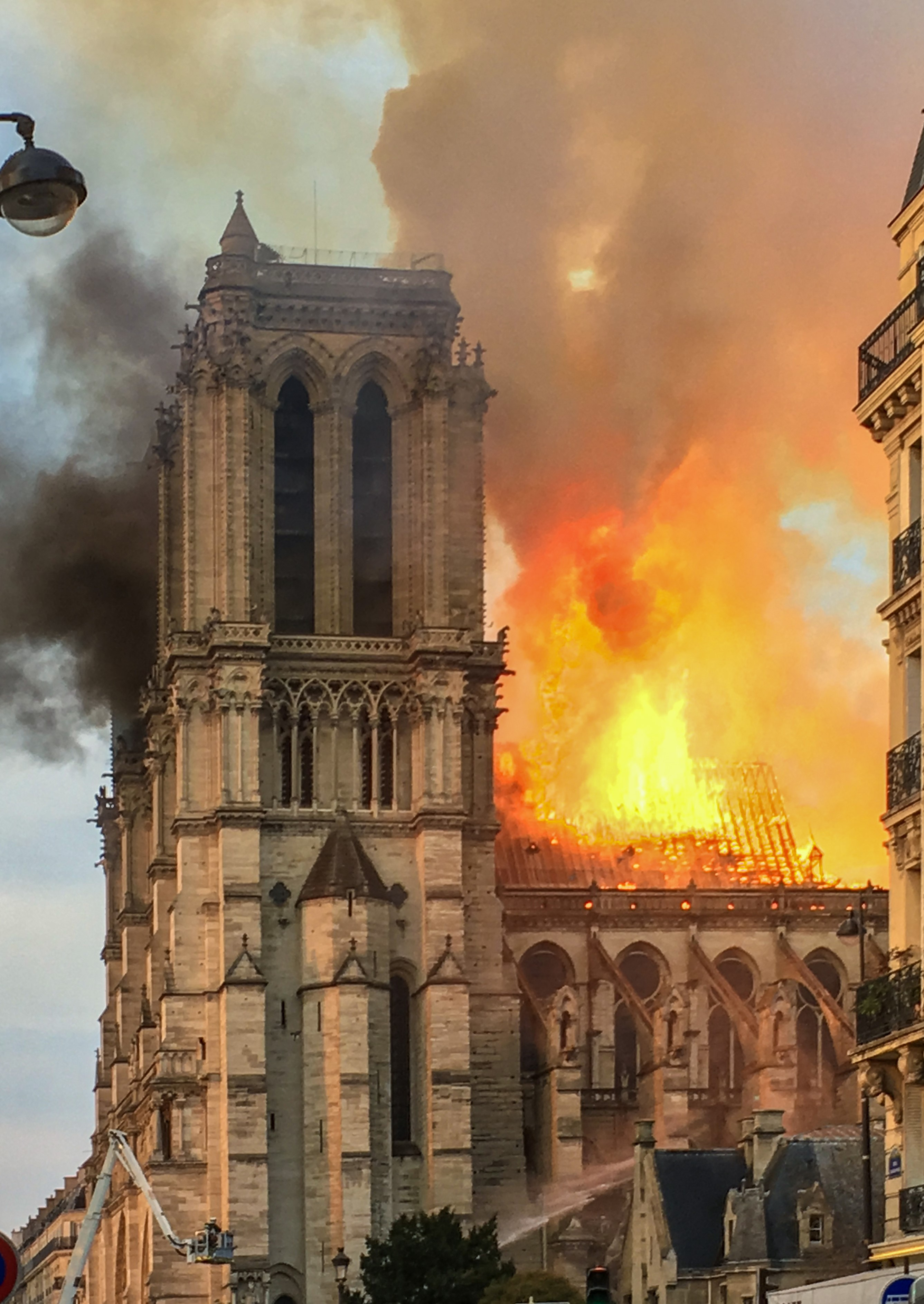 Feu dans la charpente de Notre Dame.